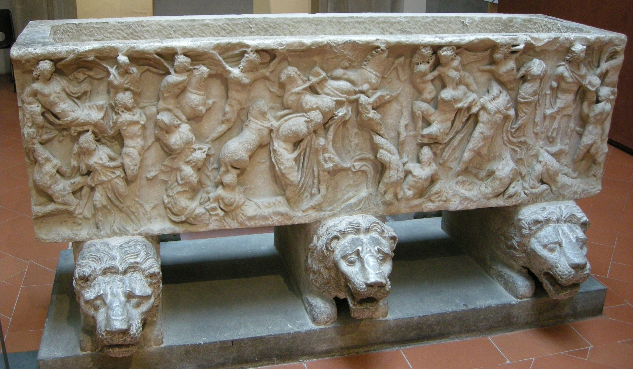 Monumento funebre a piero da farnese, in sarcofago del II secolo con mito di fetonte